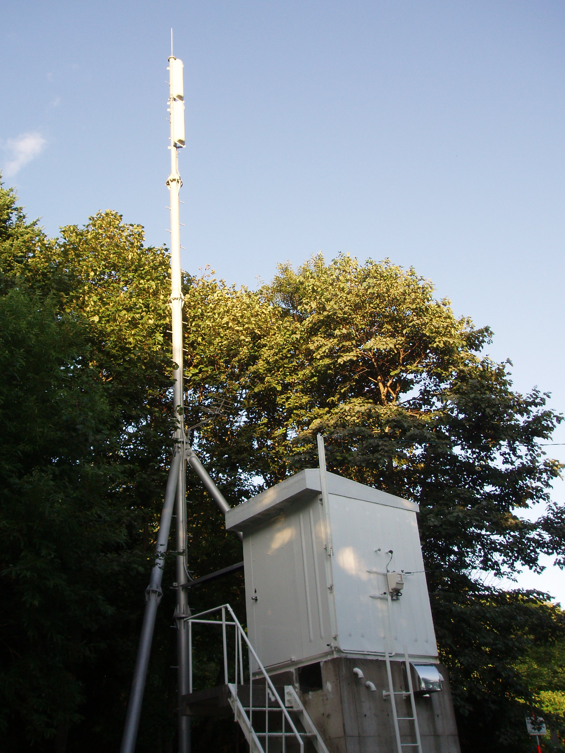 北洞爺中継局